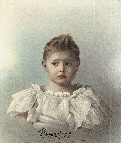 Портрет Княжны Веры Константиновны. 1907 год.